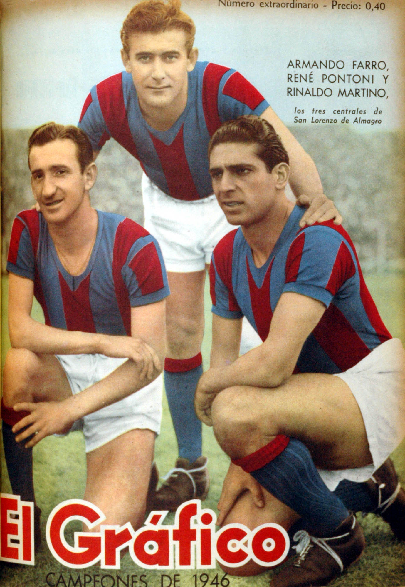 El Grafico del 03 de Enero de 1947. Edicion 1434